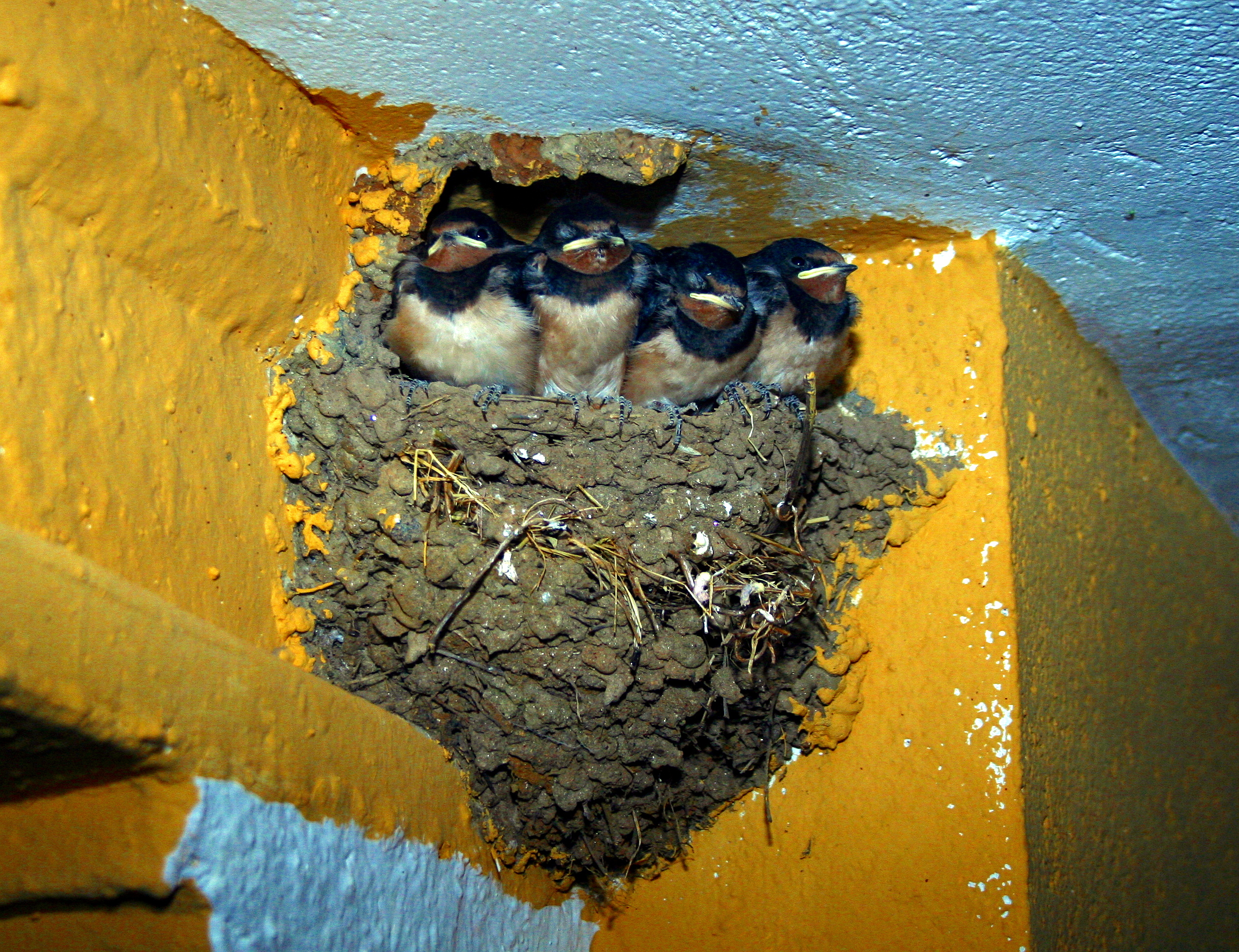 Crías de Hirundo rustica aprovechando las estructuras humanas para anidar.